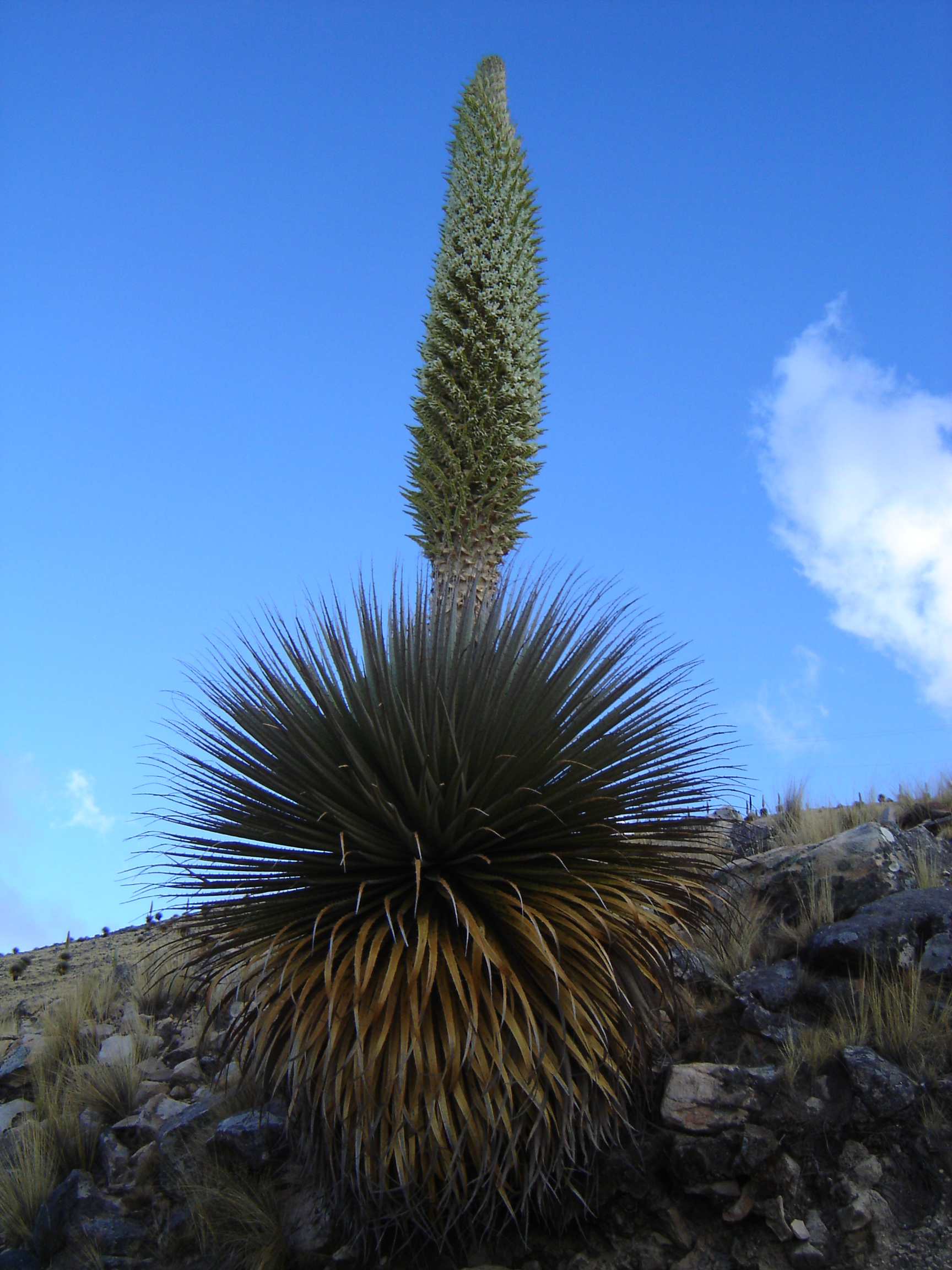 Runa Simi: Chukiqayara mallki Khurupampa urqupi, Wak'as munisipyupi, Wuliwya suyupi.